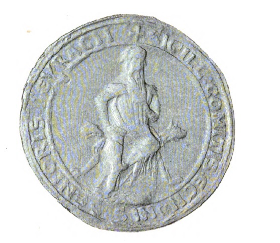 Siegel des Grafen Egino IV. von Urach auf einer Urkunde von 1228